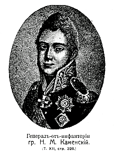 Это изображение было использовано для иллюстрирования статьи «Каменский, Николай Михайлович, граф» опубликованной в двенадцатом томе «Военной энциклопедии», который был издан книгоиздательским товариществом И. Д. Сытина в 1913 году в столице Российской империи городе Санкт-Петербурге.